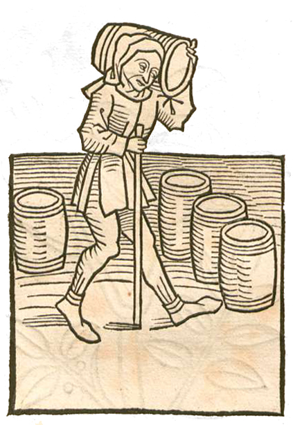 Abbildung zum Kapitel Butirum - Butter